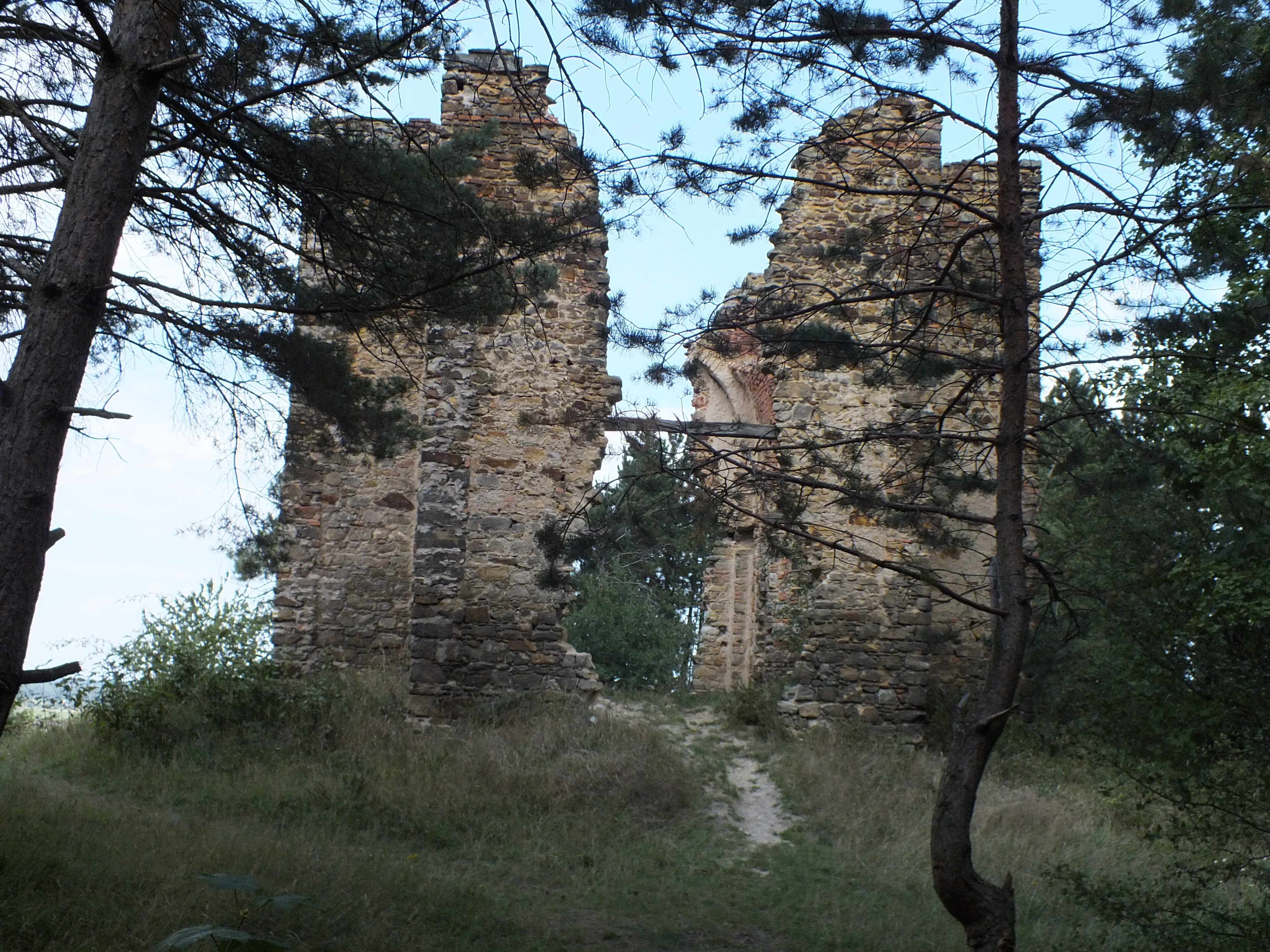 Kaple Povýšení sv. Kříže, zřícenina (Bříství), pahorek Křížová hora za obcí, Bříství